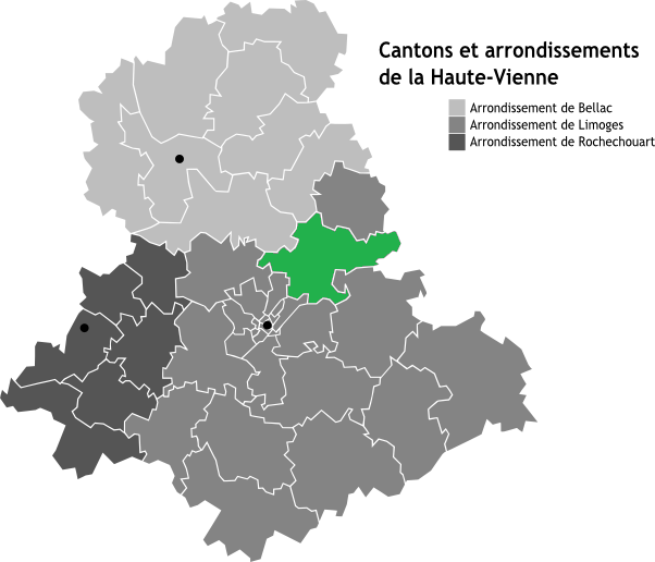 Canton de Ambazac, Limousin, France en Carte des arrondissements de la Haute-Vienne